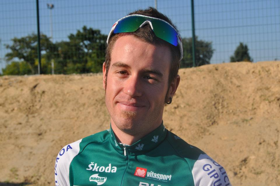 Au Tour de Vendée 2011